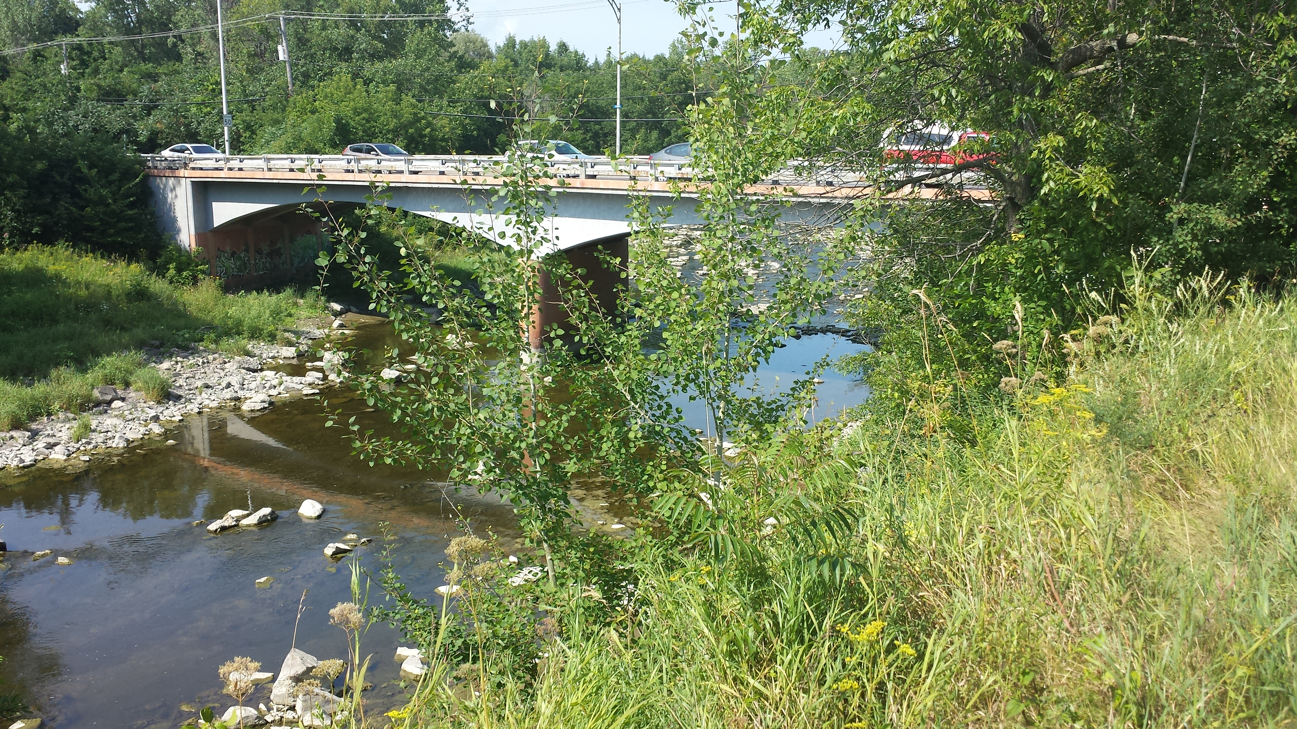 Ce pont de la Route des patriotes enjambe la rivière des Hurons à Saint-Mathias-sur-Richelieu (Québec, Canada) et est le dernier pont avant l'embouchure de la rivière, située à 0,5 km en aval.